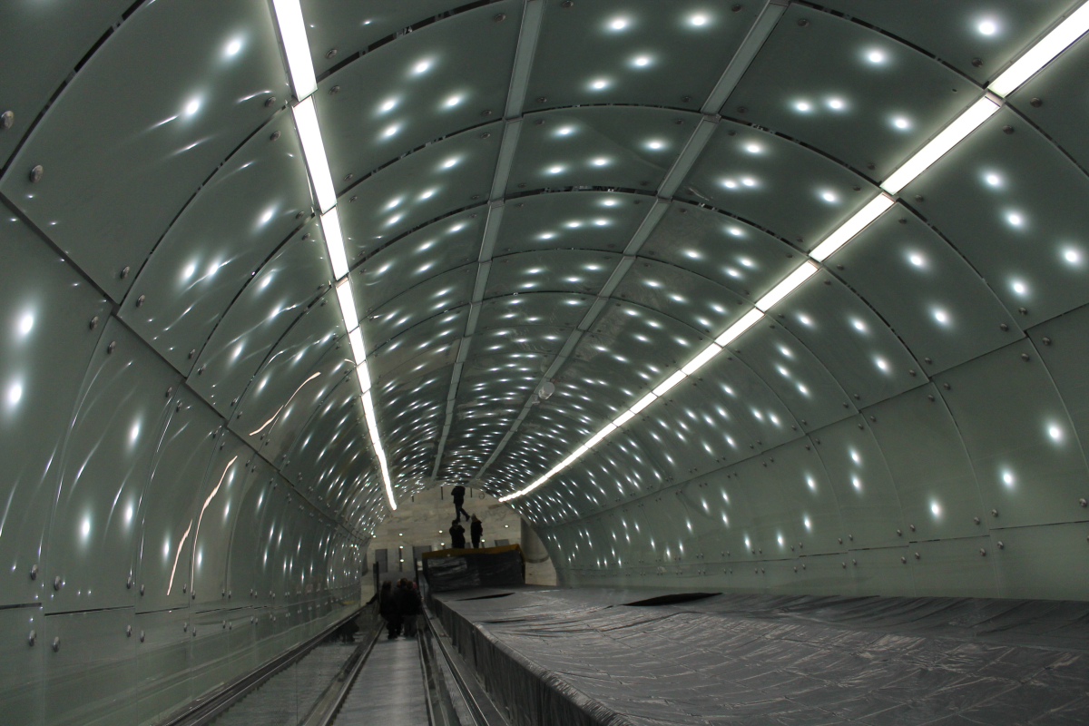 Schody prowadzące z antresoli zachodniej na peron stacji C13 Centrum Nauki Kopernik.